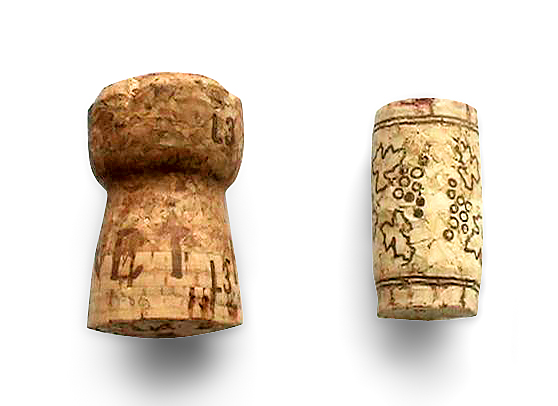 Zwei Korken, links ein Sektkorken und rechts ein Weinkorken Photograph: Benutzer:Tullius